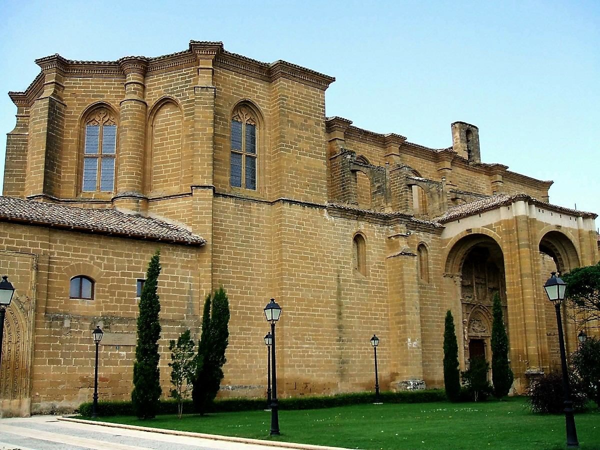 Monasterio de monjas dominicas de Nuestra Señora de la Piedad (s-XVI), en Casalarreina, La Rioja, España/Spain